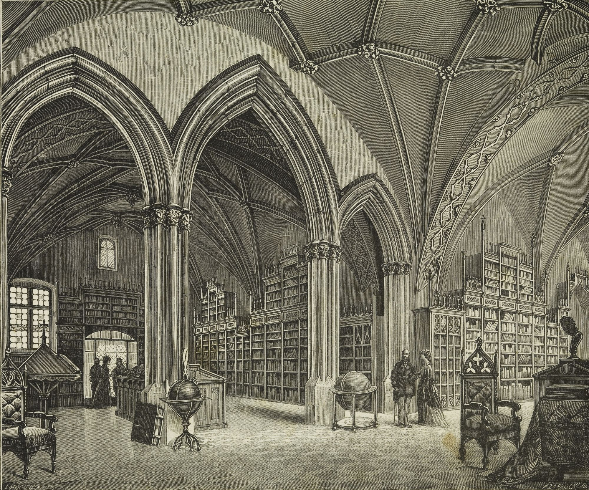 "Sala główna Biblioteki Uniwersytetu w Krakowie" (drzeworyt sztorcowy)